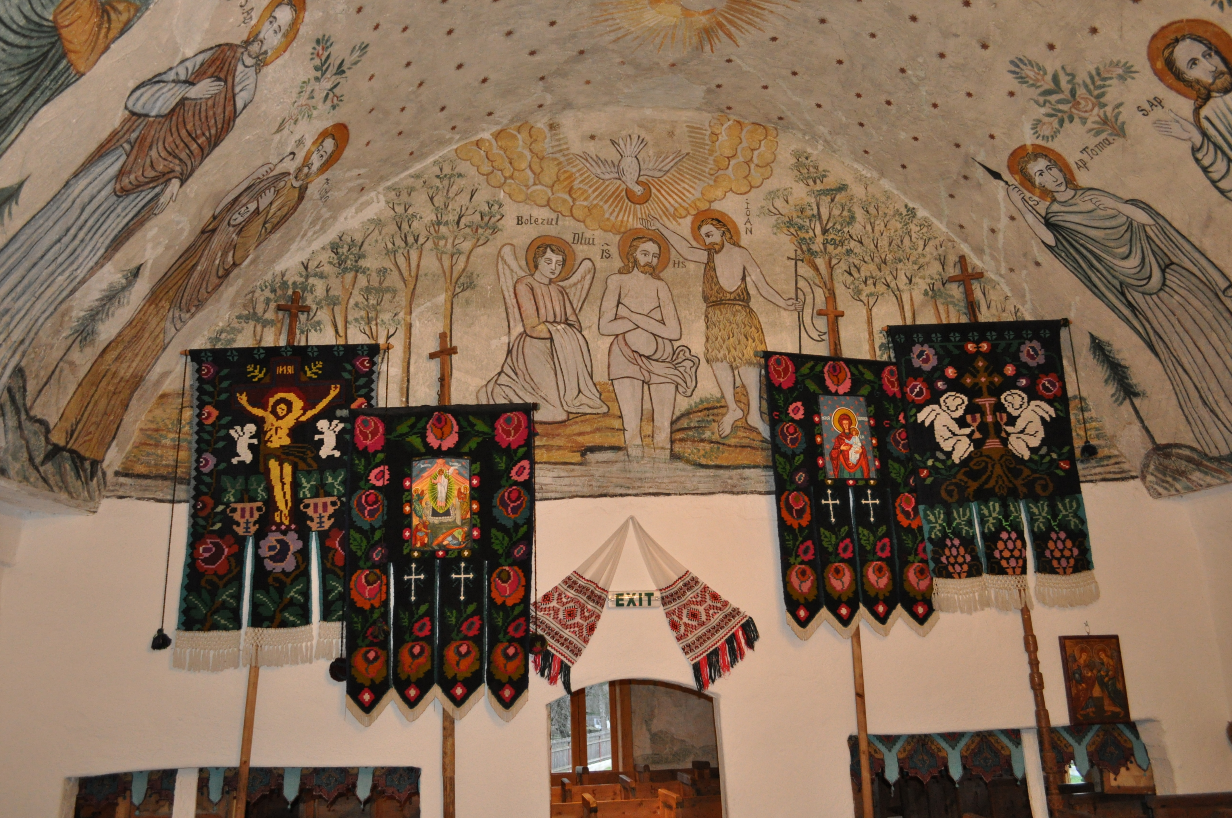 Biserica de lemn „Adormirea Maicii Domnului”,sat STĂNIJA; comuna BUCEŞ